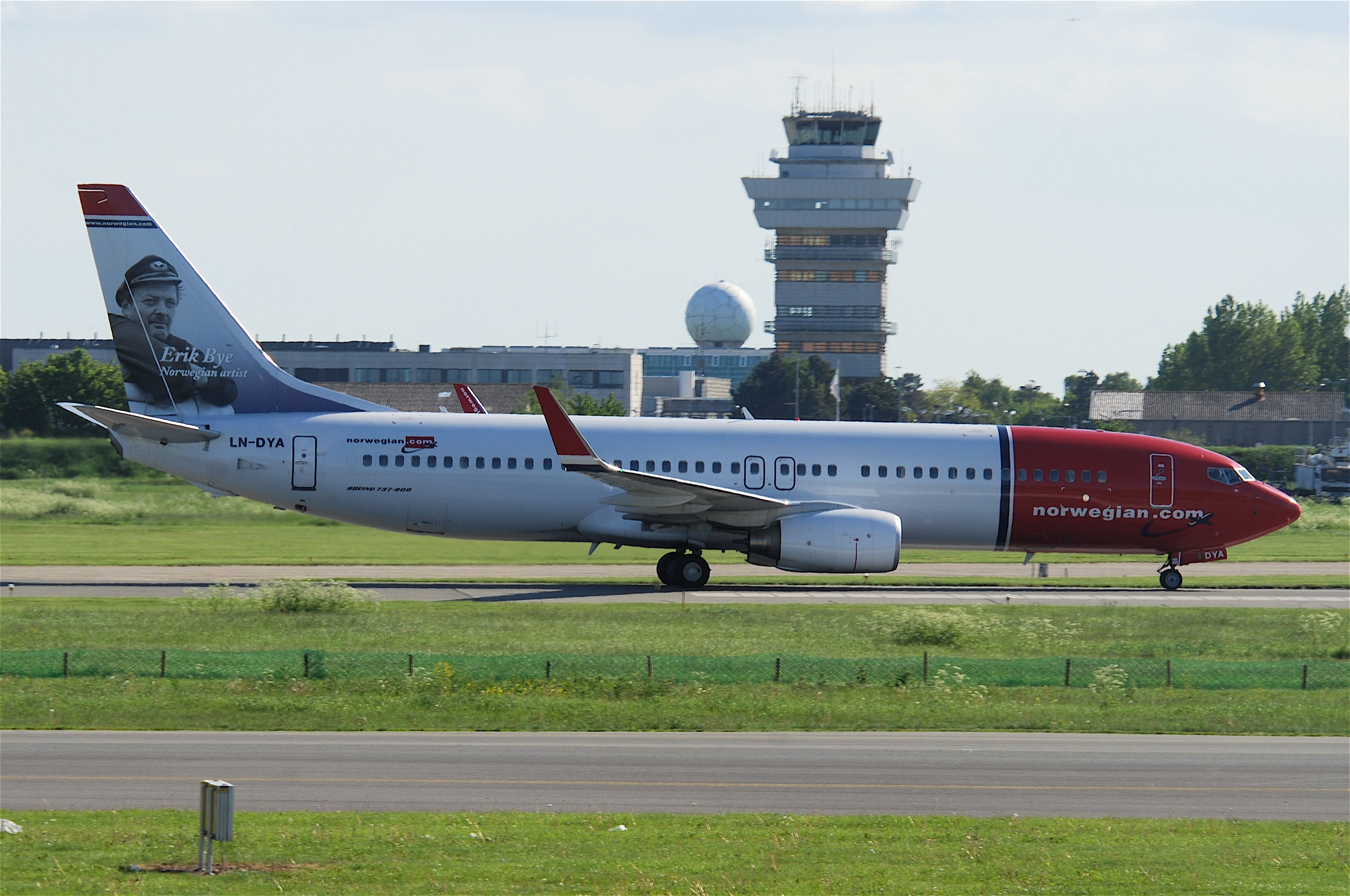 LN-DYA@CPH;04.06.2010/575ae